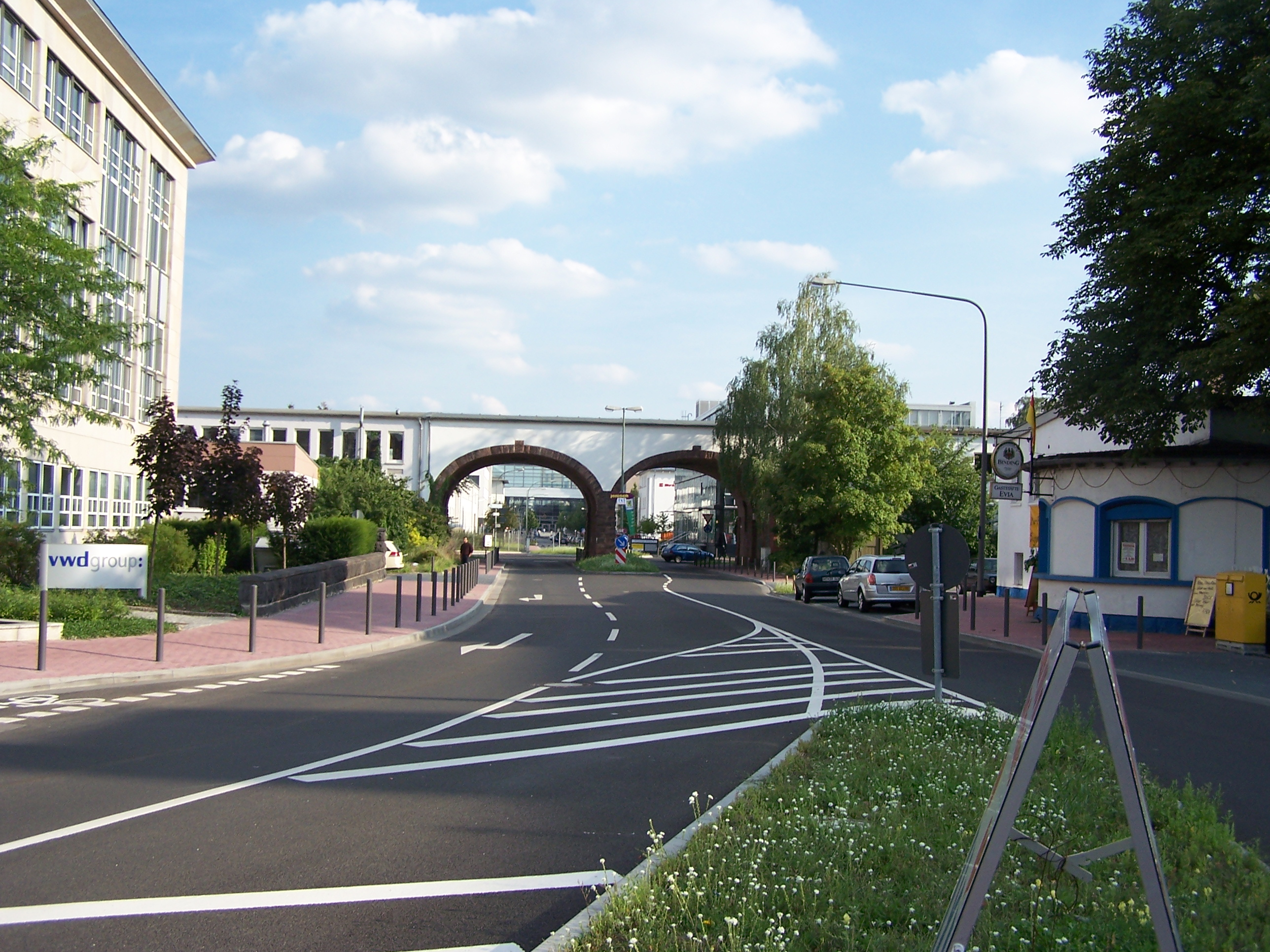 Torbogen zur Industriehof-Kaserne, Frankfurt-Bockenheim